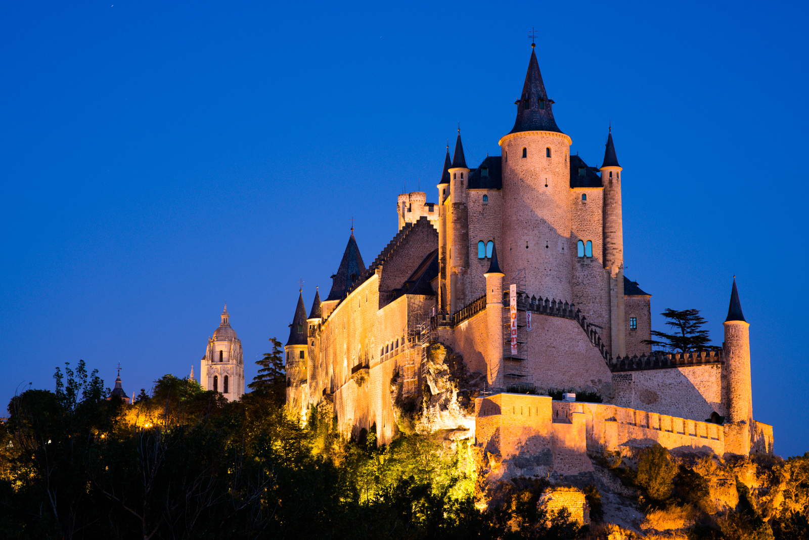 Atardecer, toma 2